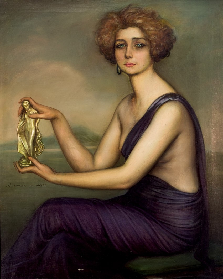 Retrato de Teresa Wilms Montt por Julio Romero de Torres.